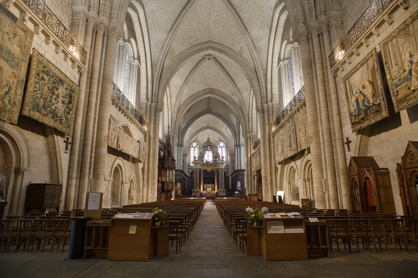 cathédrale avec ses tapisseries .